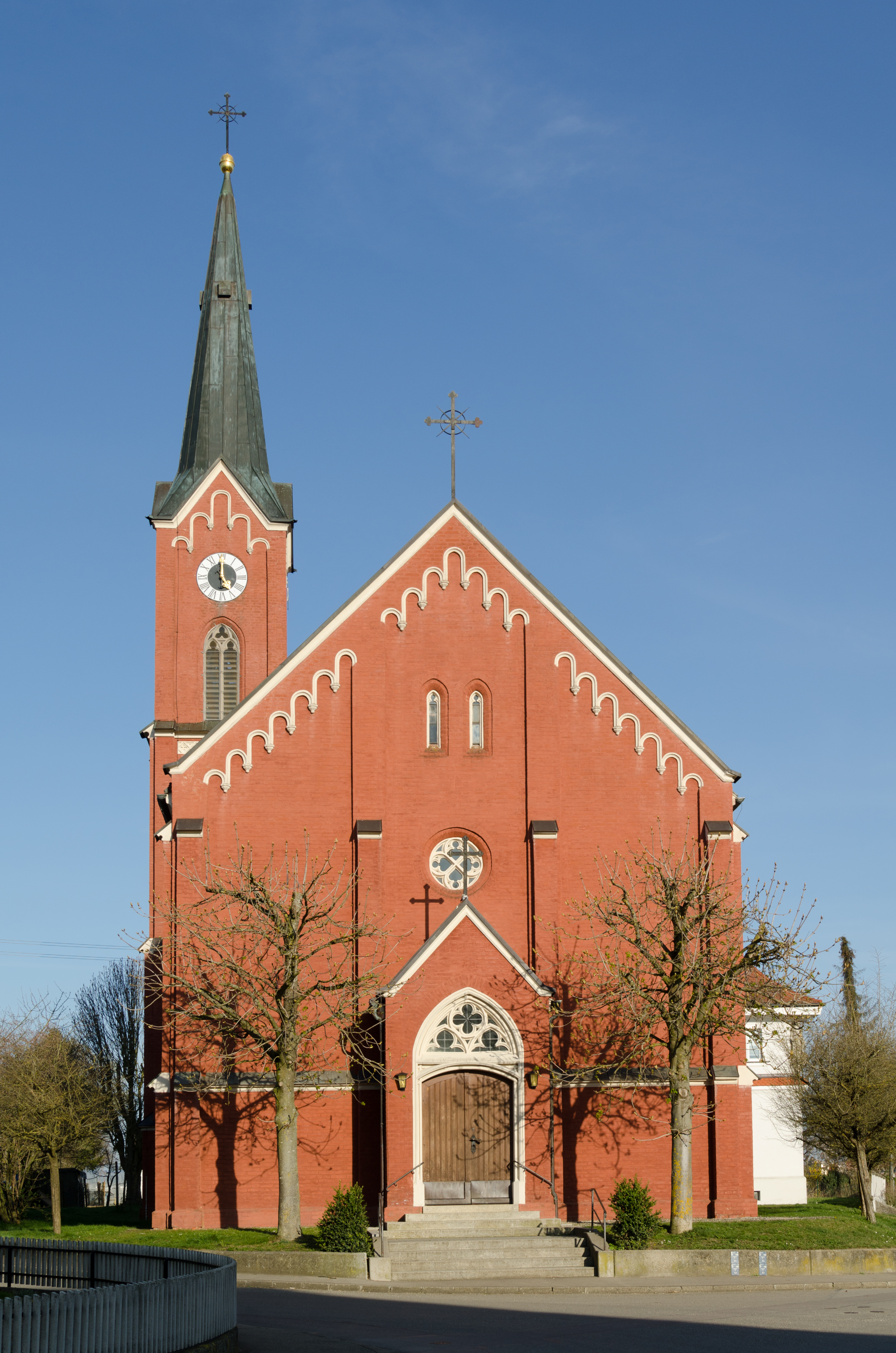 Bibertal, Echlishausen, Katholische Pfarrkirche St. Leonhard